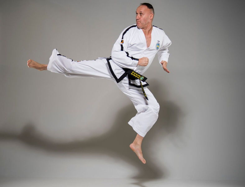 hyppypotku studiossa